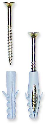 Dübel mit Schraube Hinweis vom Urheber des Bildes: Dieses Bild wurde von mir selbst erstellt und im Sinne der GFDL freigegeben (This Image is licensed to the public under the GNU Free Documentation License). Die Verwendung dieses Bildes ist somit inner- und außerhalb von Wikipedia FREI und ausdrücklich erwünscht. -- Horst Frank 02:14, 22. Dez 2003 (CET) 03:11, 22. Dez 2003 Horst Frank 159 x 415 (27953 Byte)